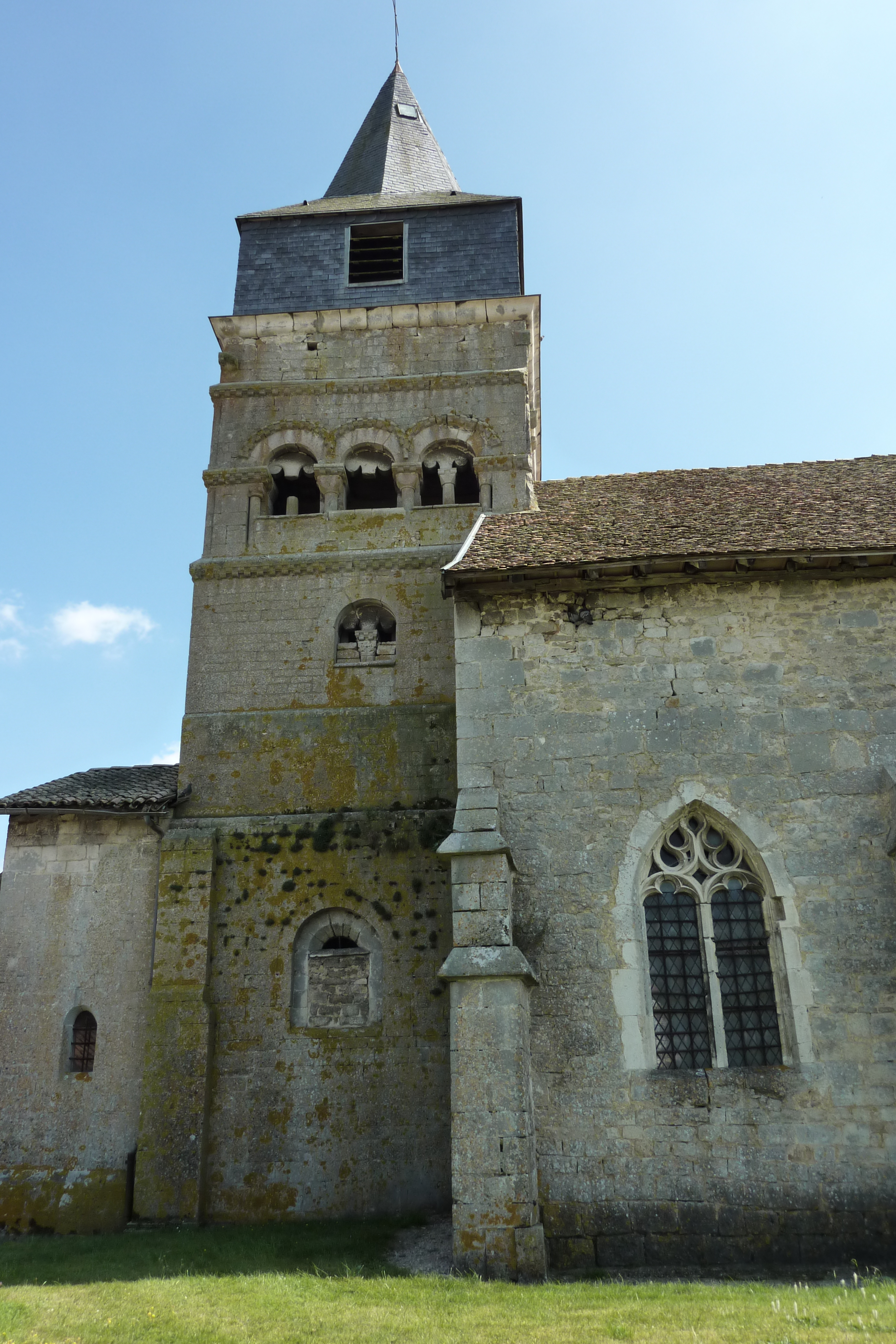 Kirche St. Brice in Autreville